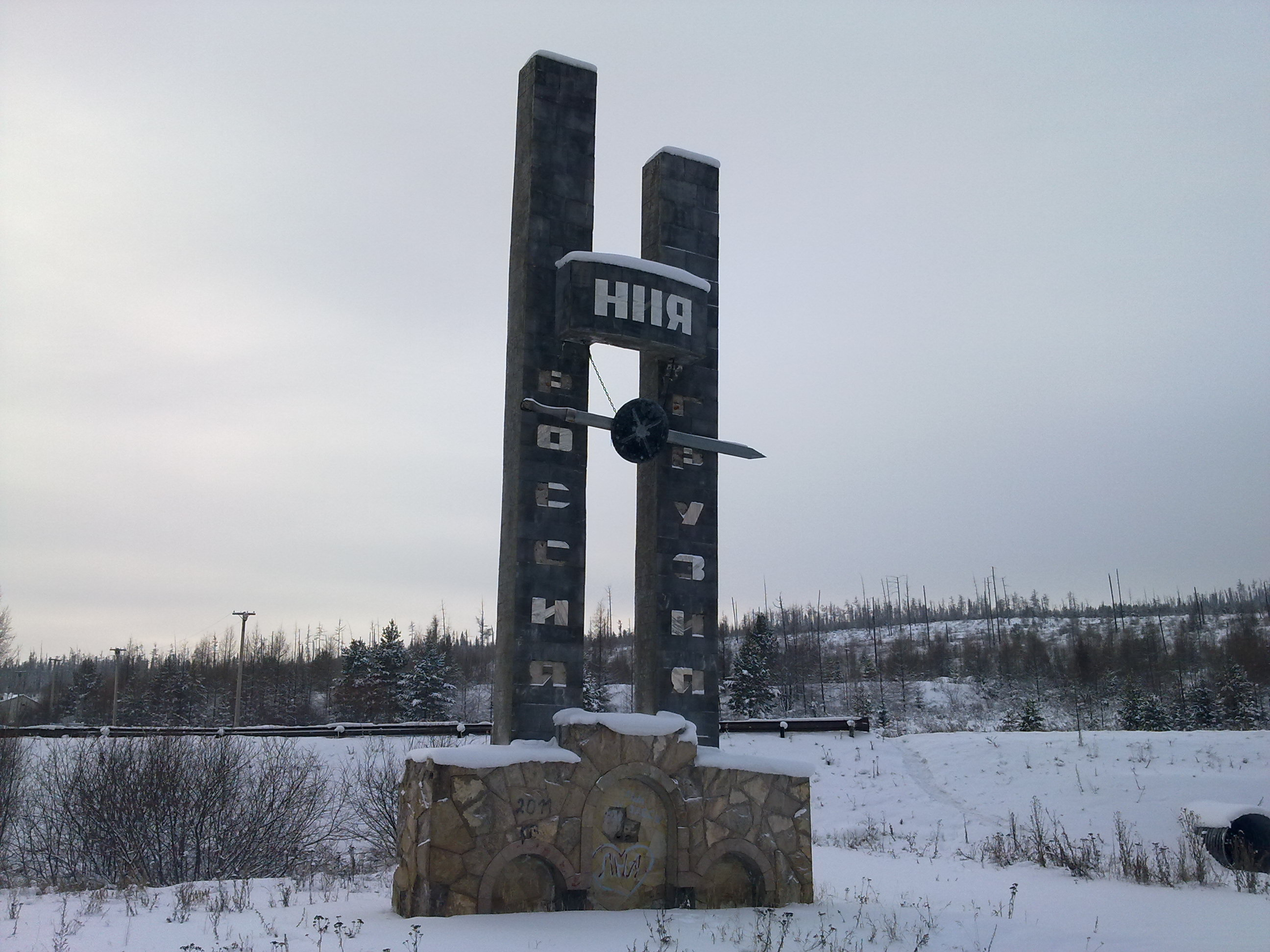 Памятник Нии "Ния Грузинская", находящийся около центральной дороги.